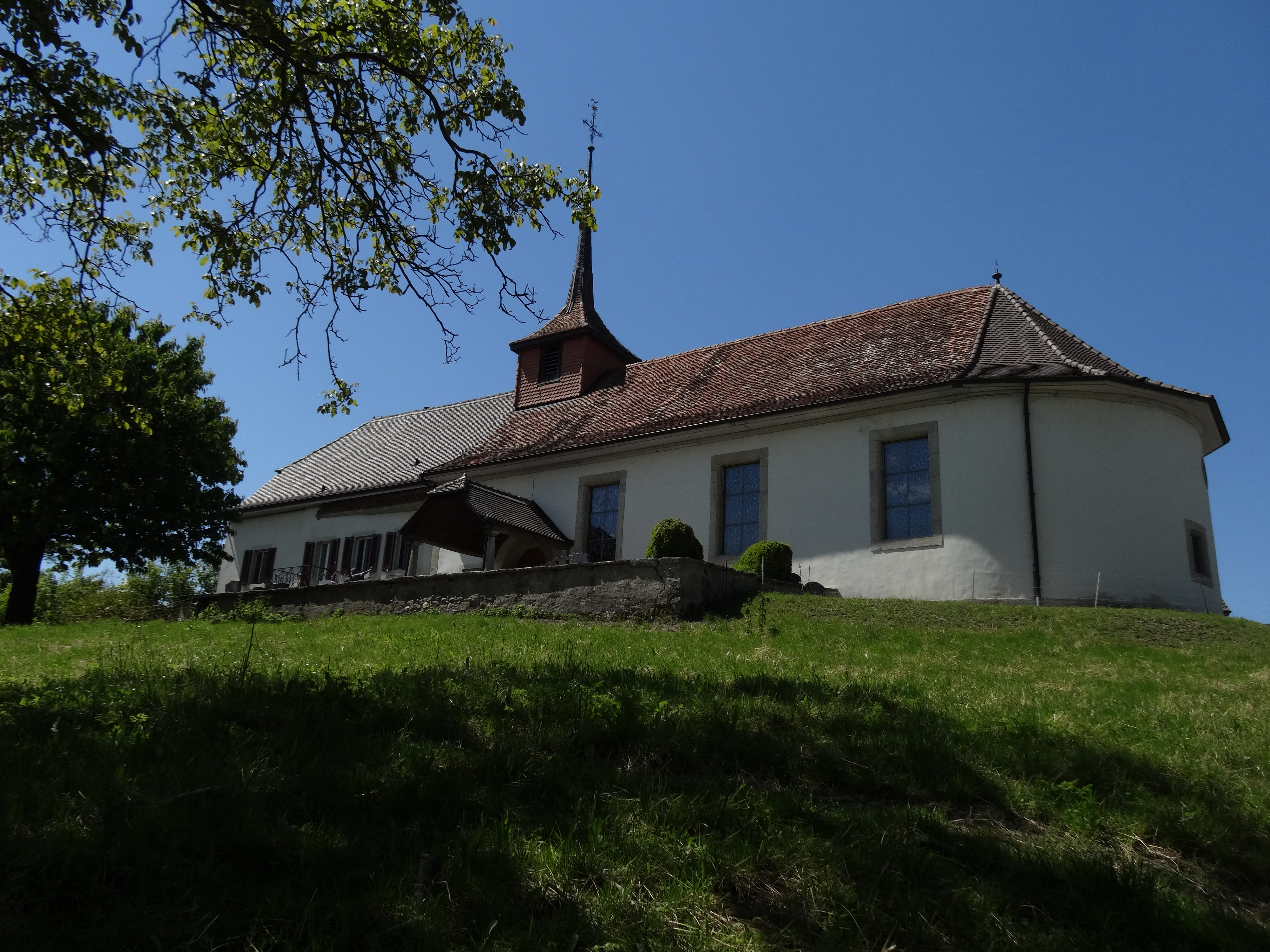 L'église Notre-Dame de Tours, de la paroisse de Montagny-Tours, est un lieu de pèlerinage. Elle se trouve près de Corcelles-près-Payerne.